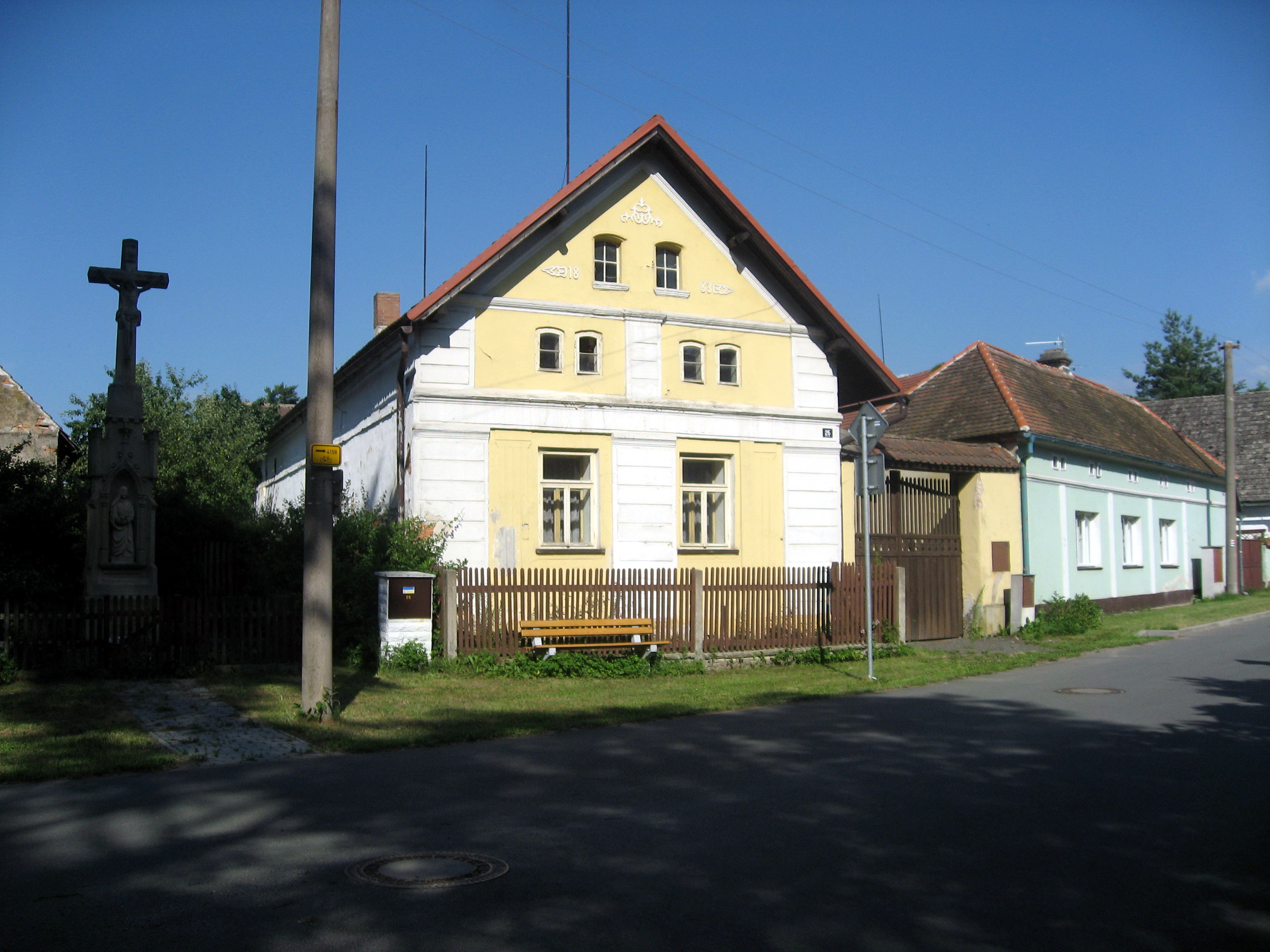 Běleč nad Orlicí